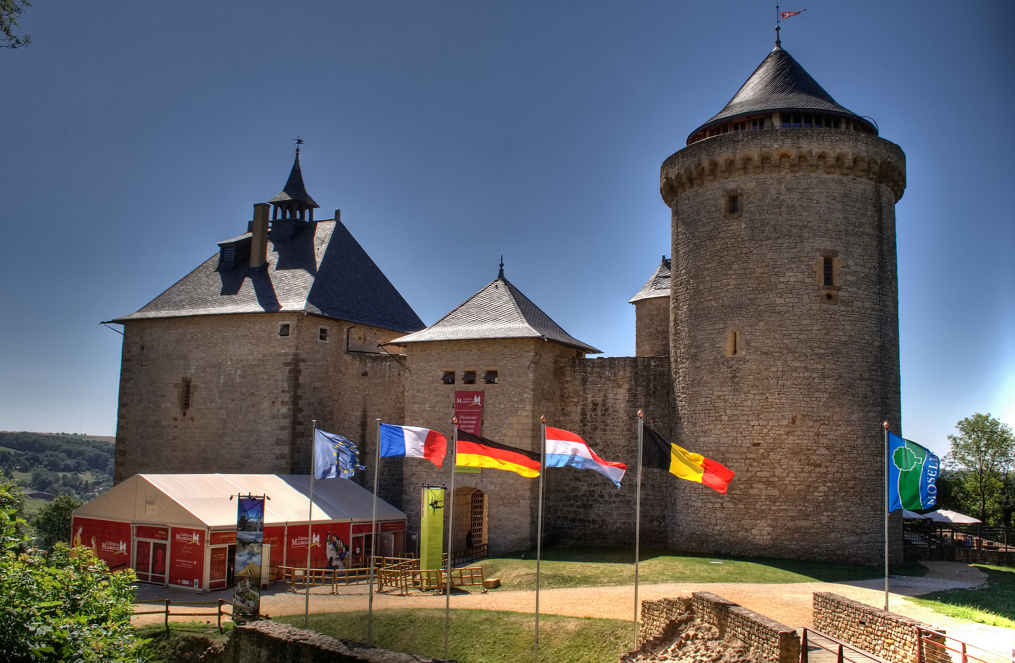 Die Burg Malbrouck (deutsch: Meinsberg) bei Mandern im Département Moselle (57)